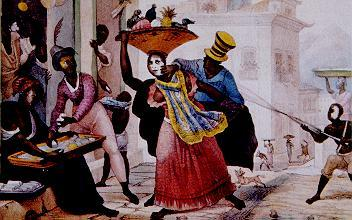 Carnival